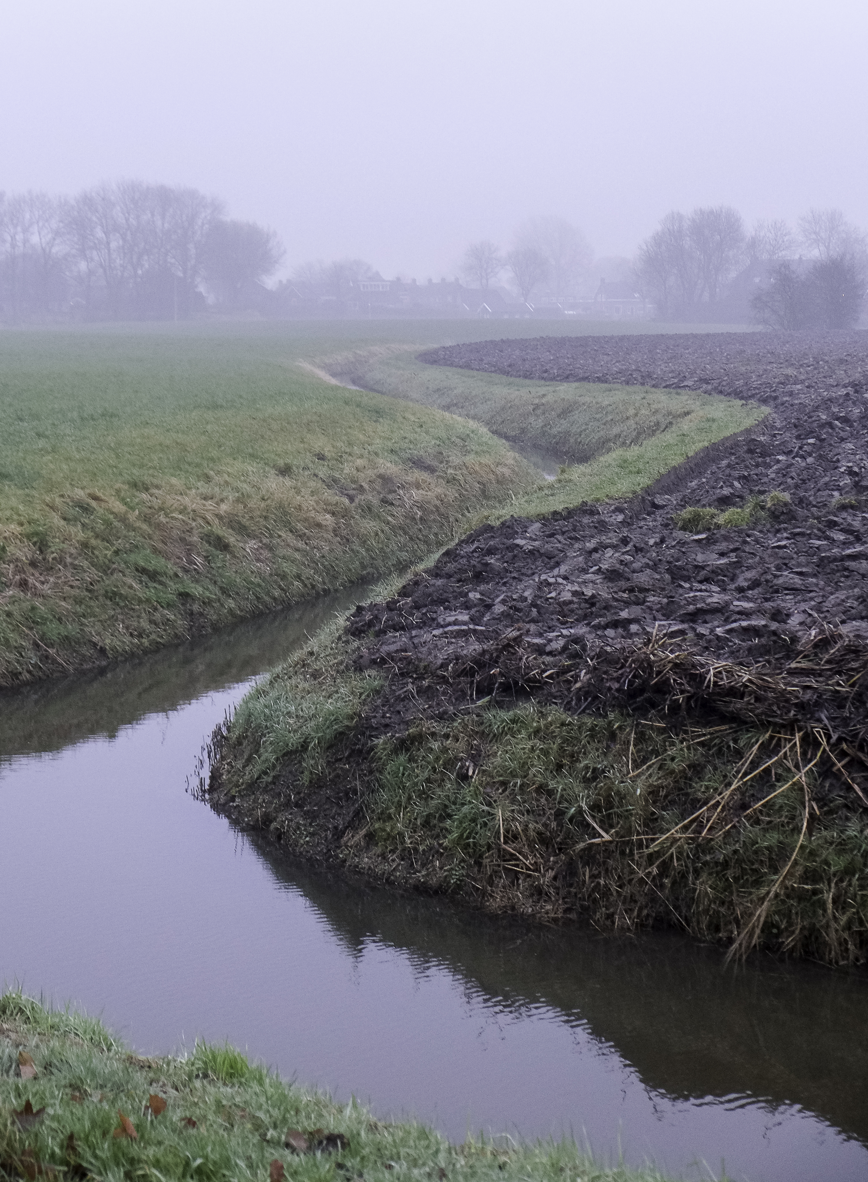 voormalige gracht naar de borgstee van de Onstaborg te Sauwerd